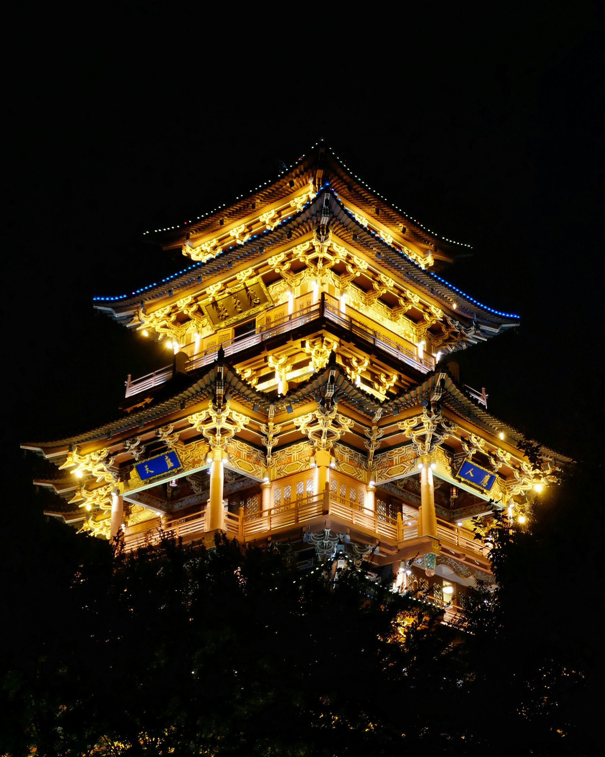 丽水应星楼夜景